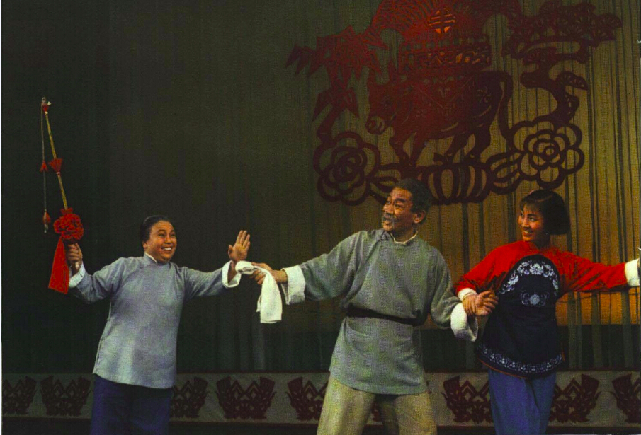 1966-01 汉剧借牛